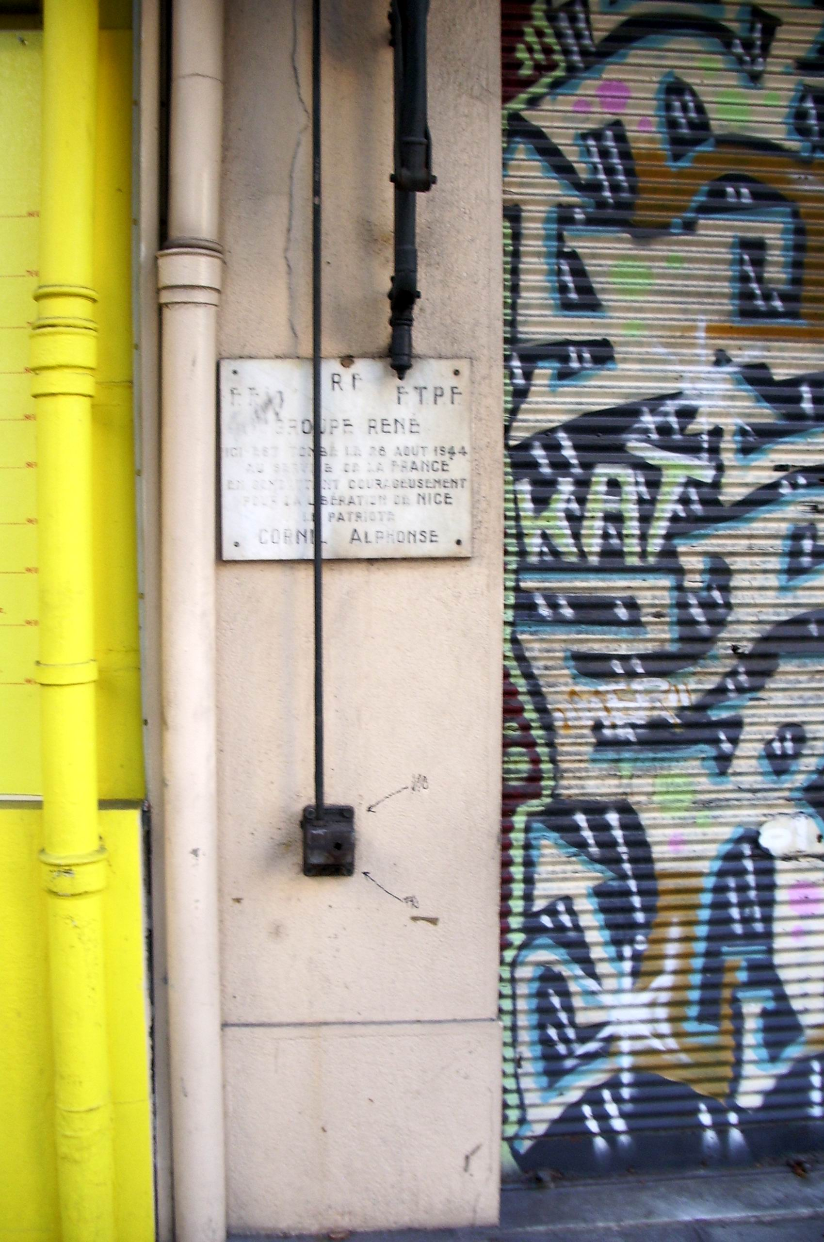 Plaque commémorative de A.Cornil au 130 Bd Gambetta Nice